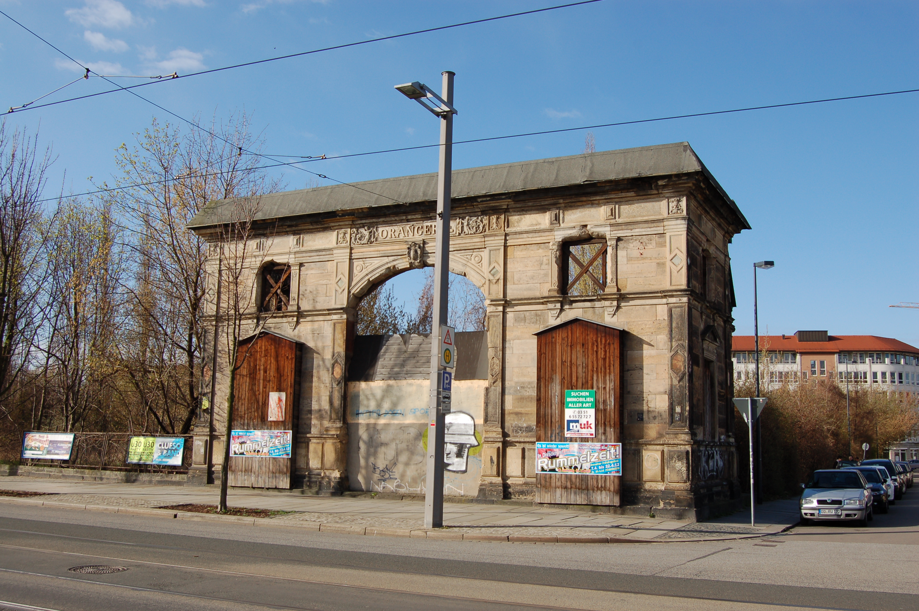 Das denkmalgeschützte Portal der Orangerie im "Der Herzogin Garten" in Dresden.